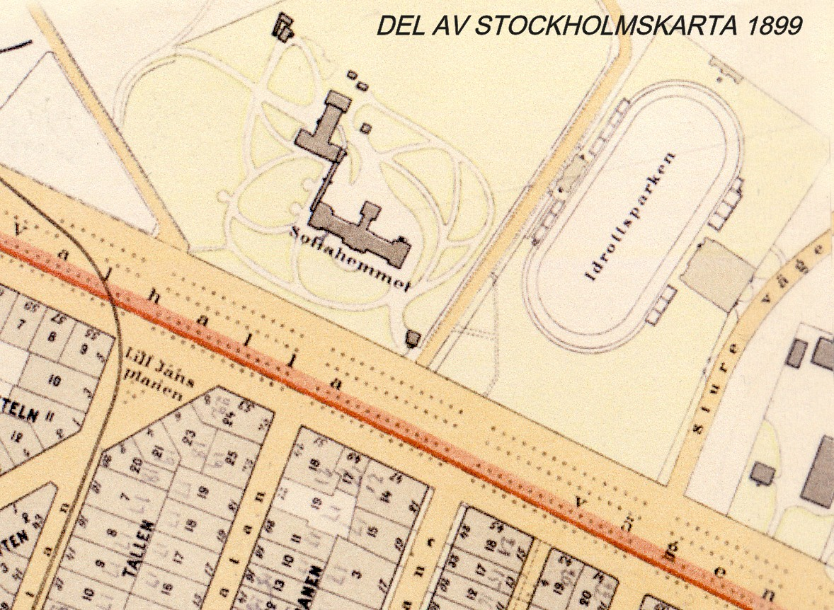 Del av Stockholmskarta (Östermalm) visande Stockholms Idrottspark